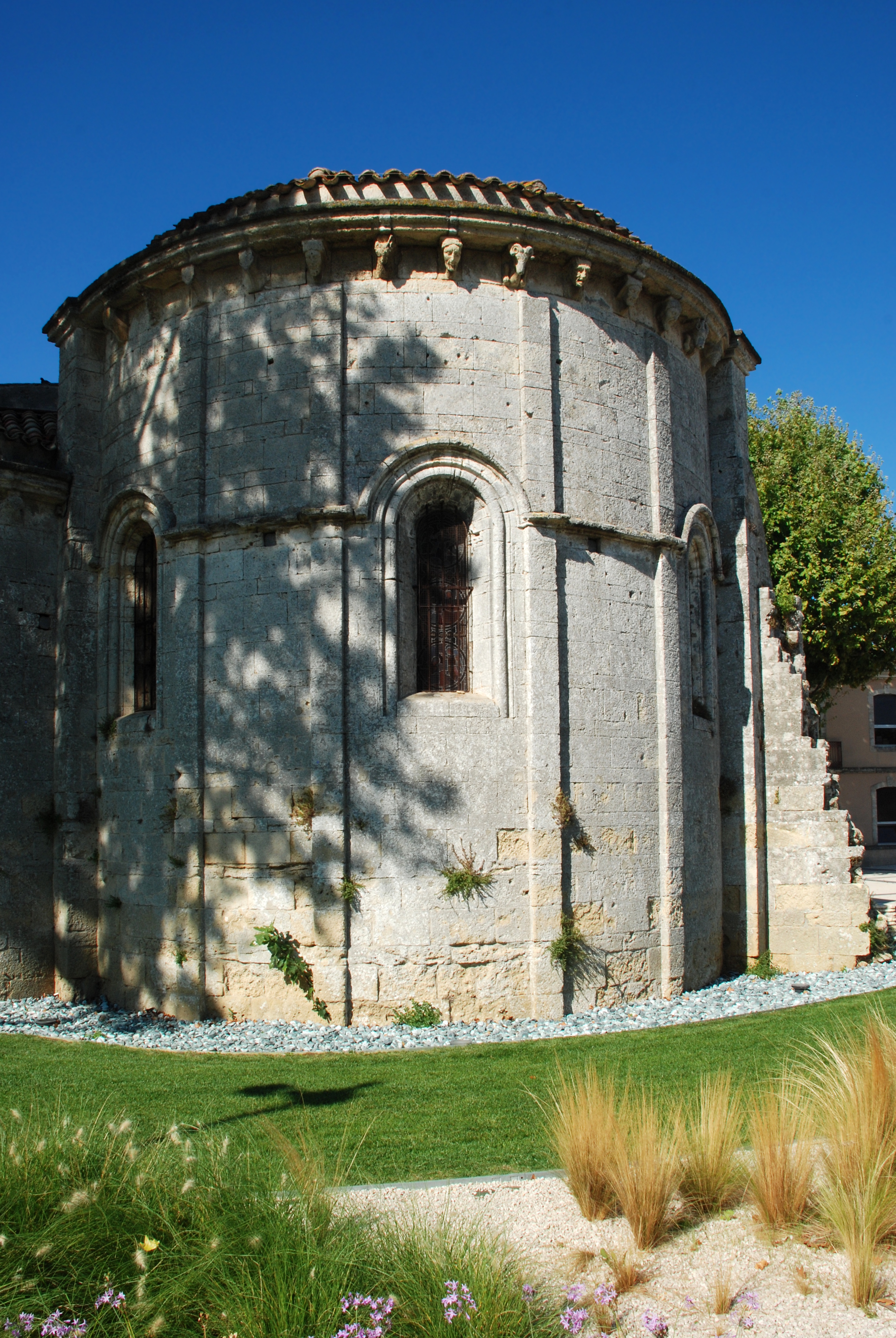 France - Languedoc - Hérault - Église Saint-Laurent de Lattes